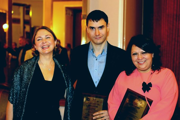 Лауреаты Международной премии имени Юлиана Семёнова 2014 года Галина Сапожникова и Сергей Шаргунов и Ольга Семенова